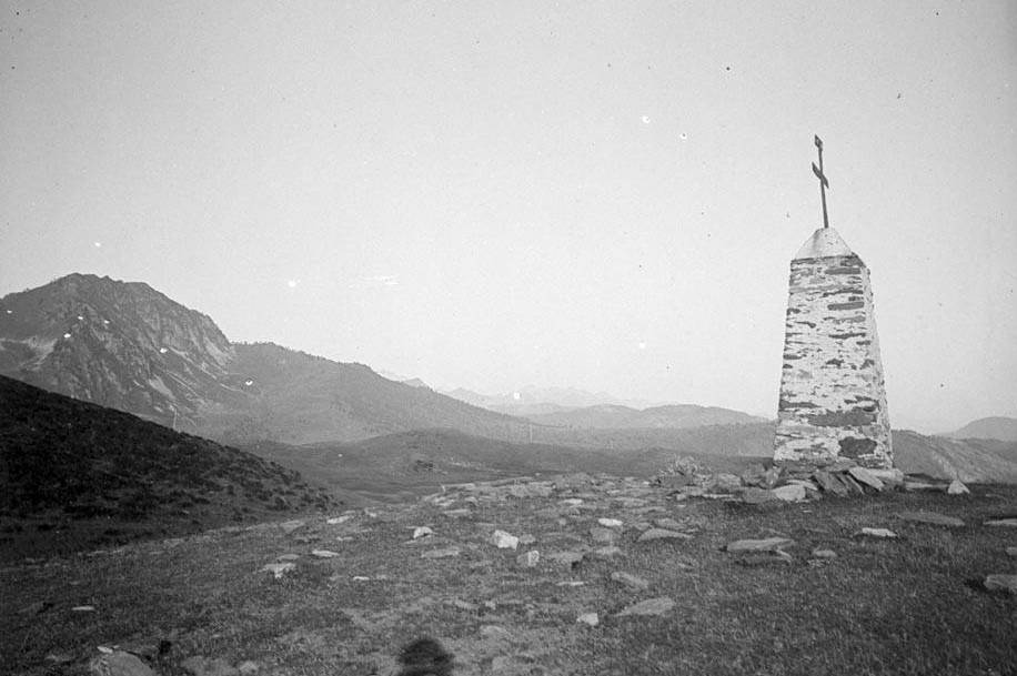 Imatge